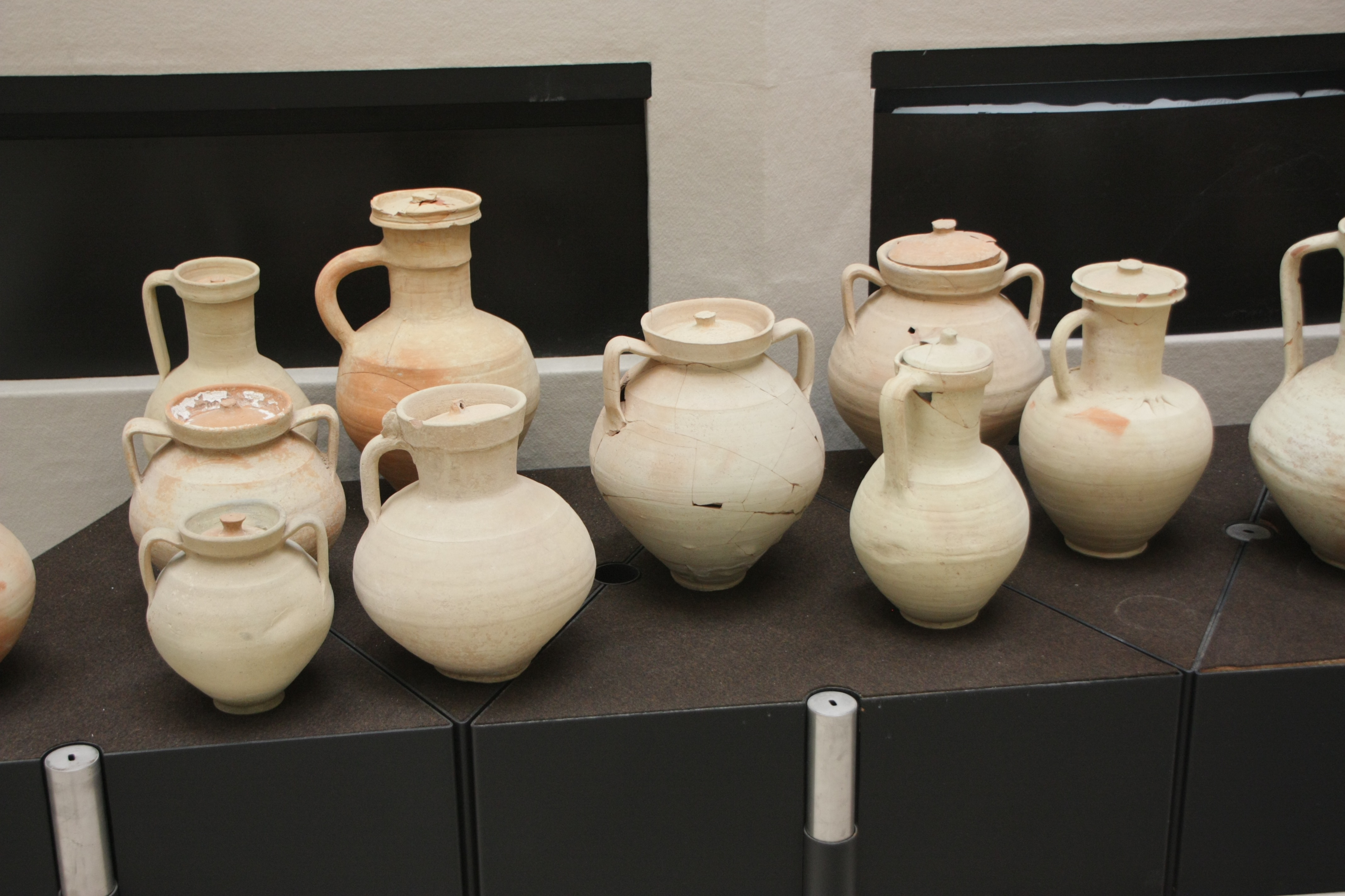 Anfore romane di Siracusa, zona Tomba di Archimede